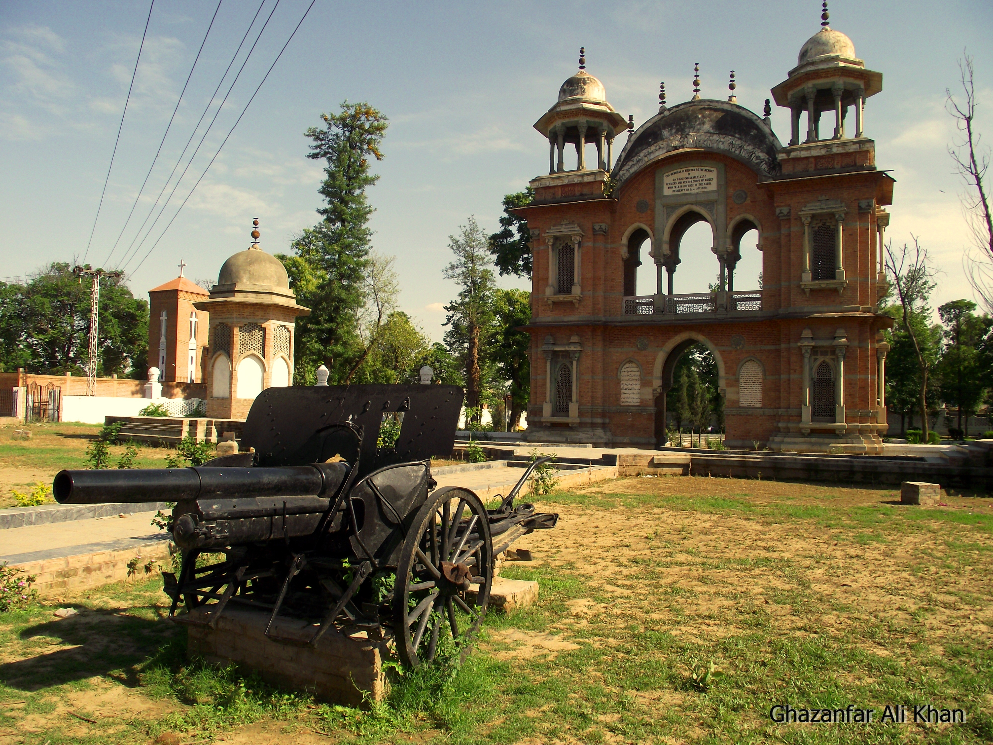 Guides Memorial, Mardan